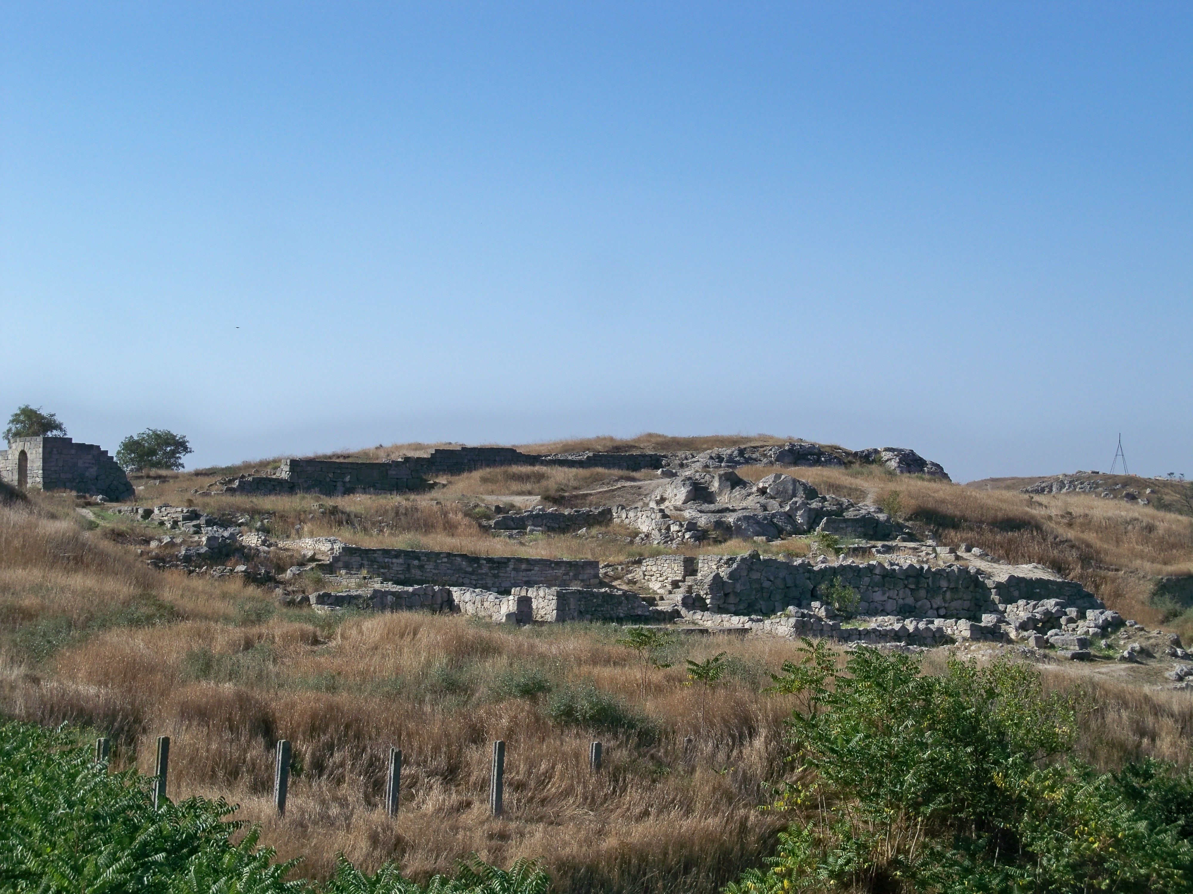 Архітектурно-археологічний комплекс «Стародавнє місто Пантікапей», Керч, вул. Рибакова, гора Мітрідат, північний та північно-східний схили